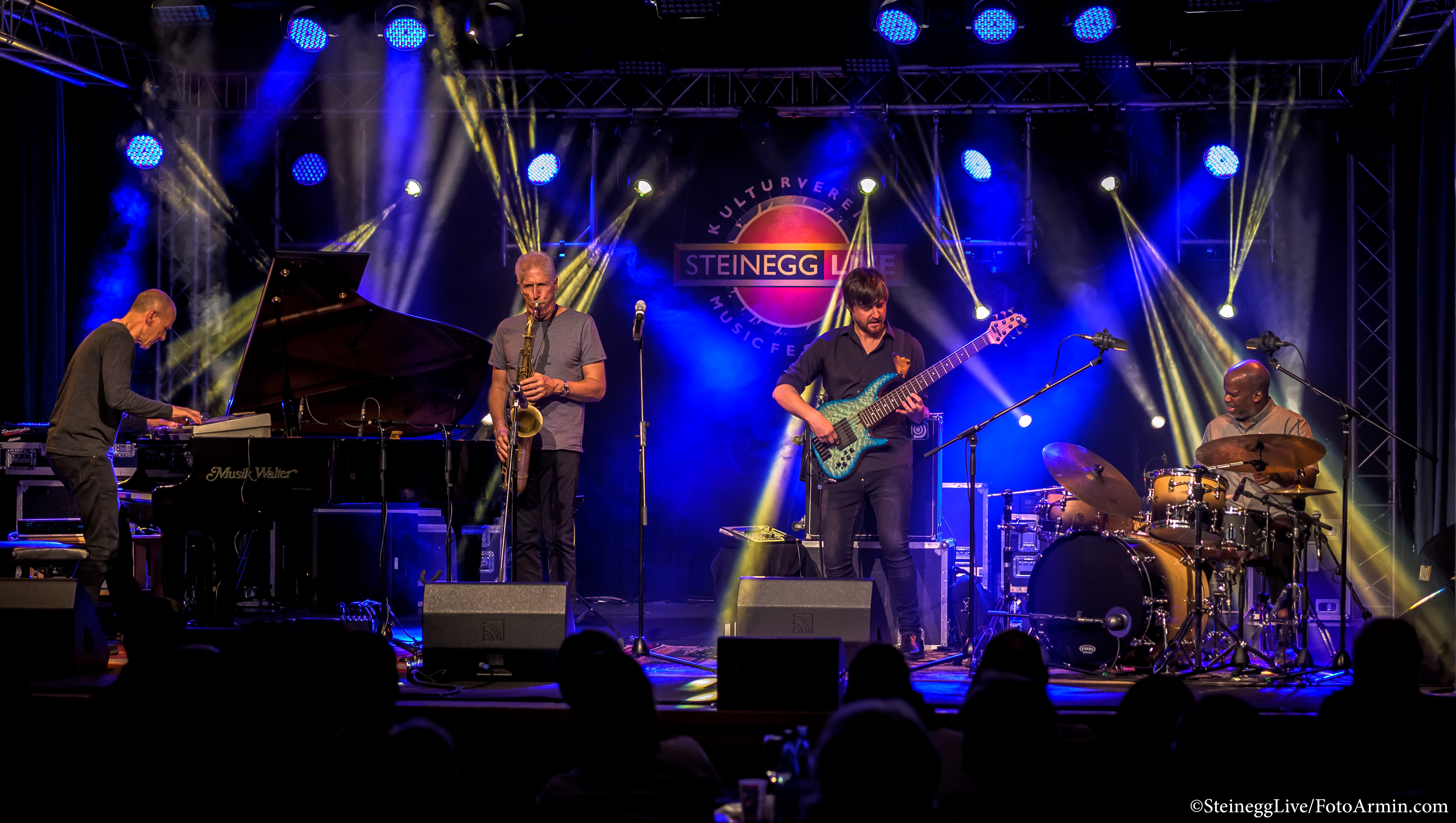 Yellowjackets beim Auftaktkonzert der Europatour 2019 in Steinegg bei Bozen in Südtirol. vlnr.: Russell Ferrante, Bob Mintzer, Dane Alderson, Will Kennedy